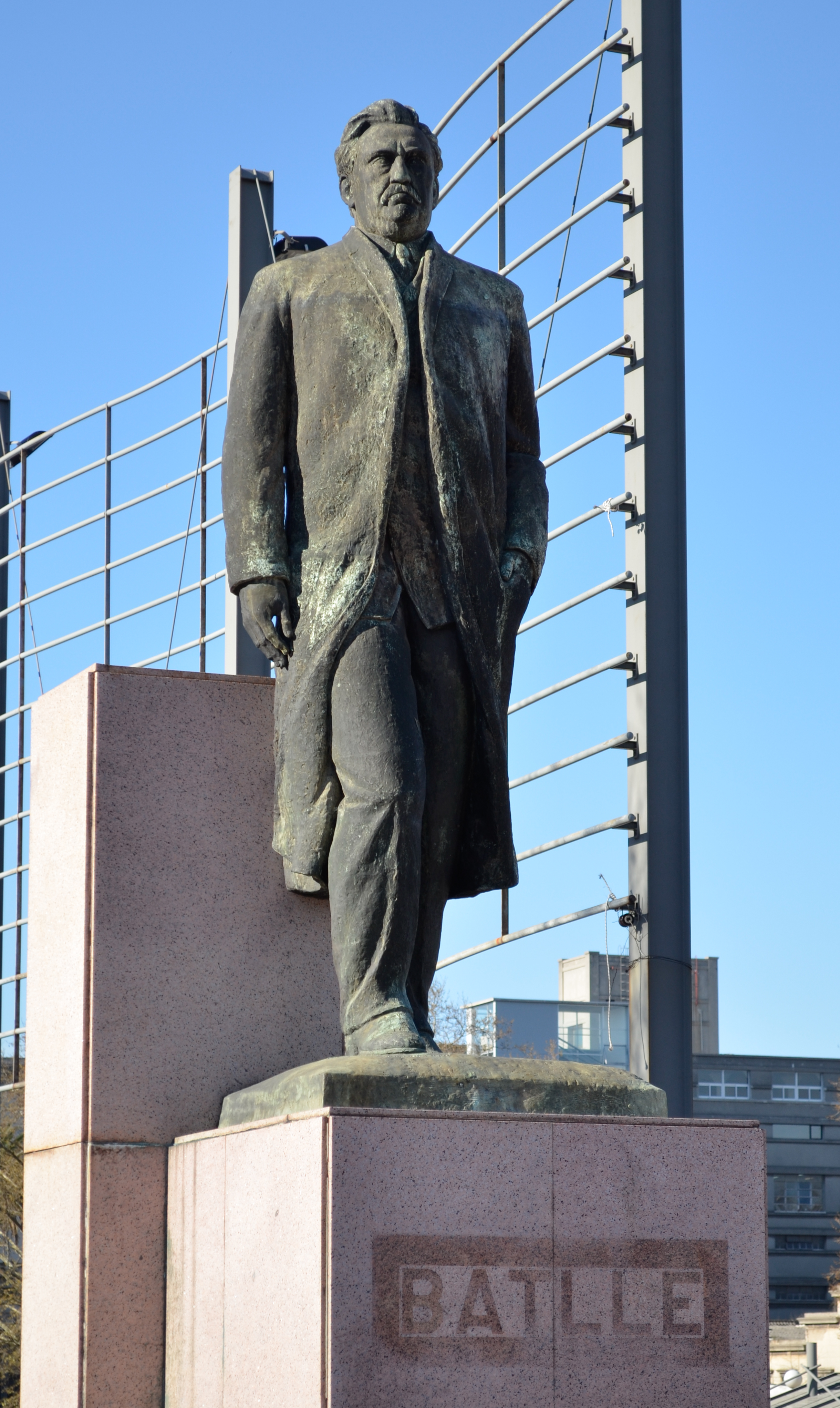 José Batlle y Ordóñez. Ubicada en el departamento de Montevideo